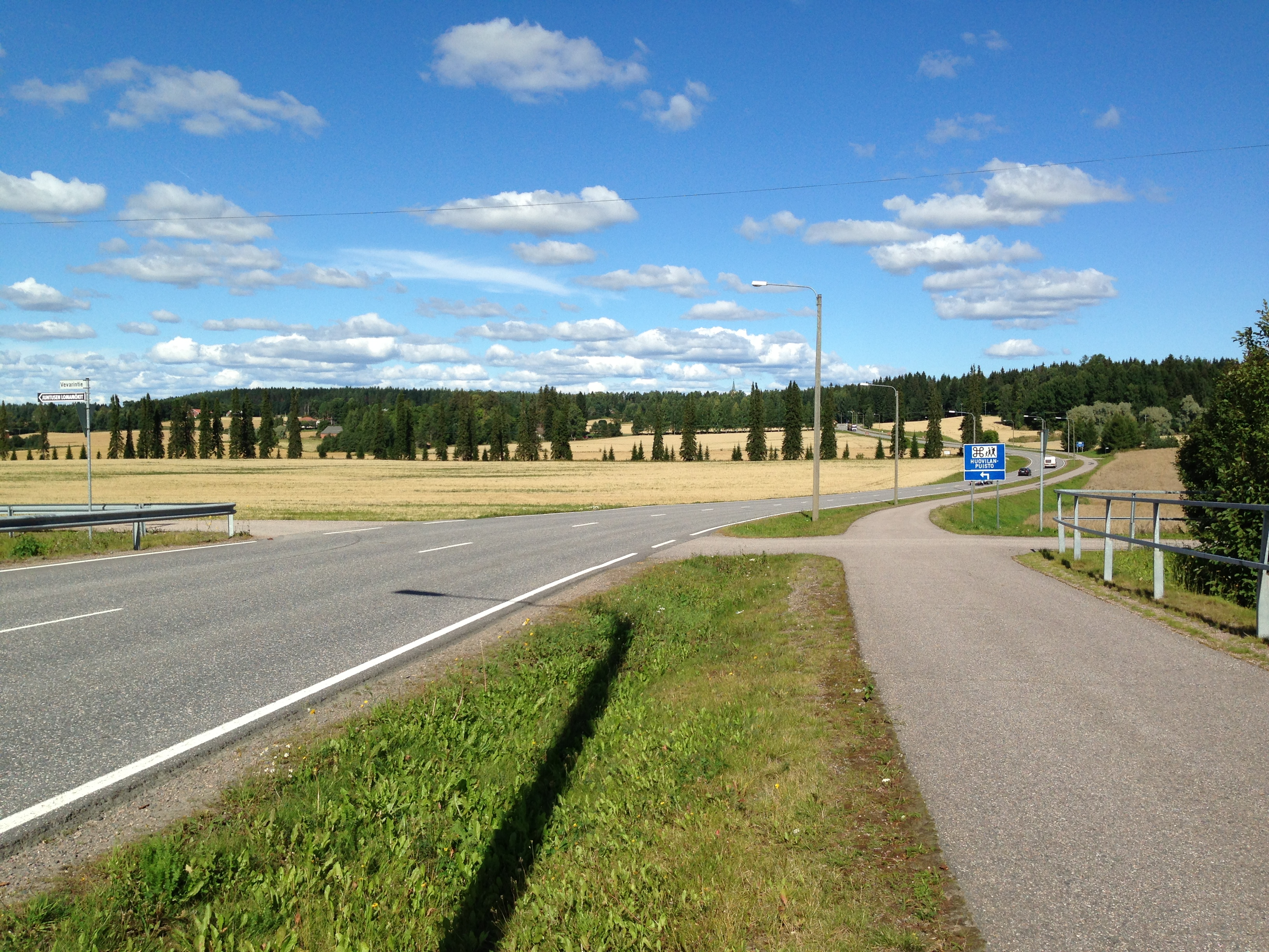 Seututie 295 Kärkölässä Kärkölän kirkonkylälle päin.